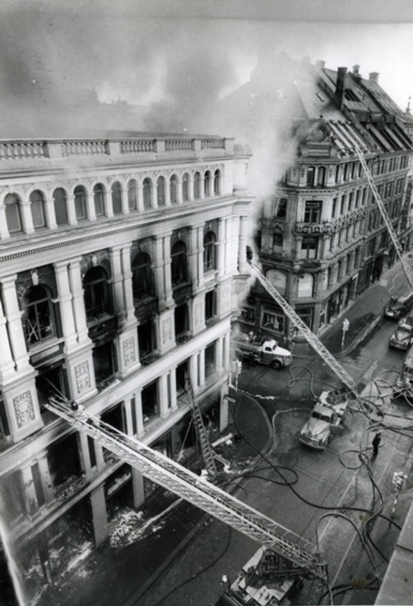 Brannen i Robsahmgården februar 1959.